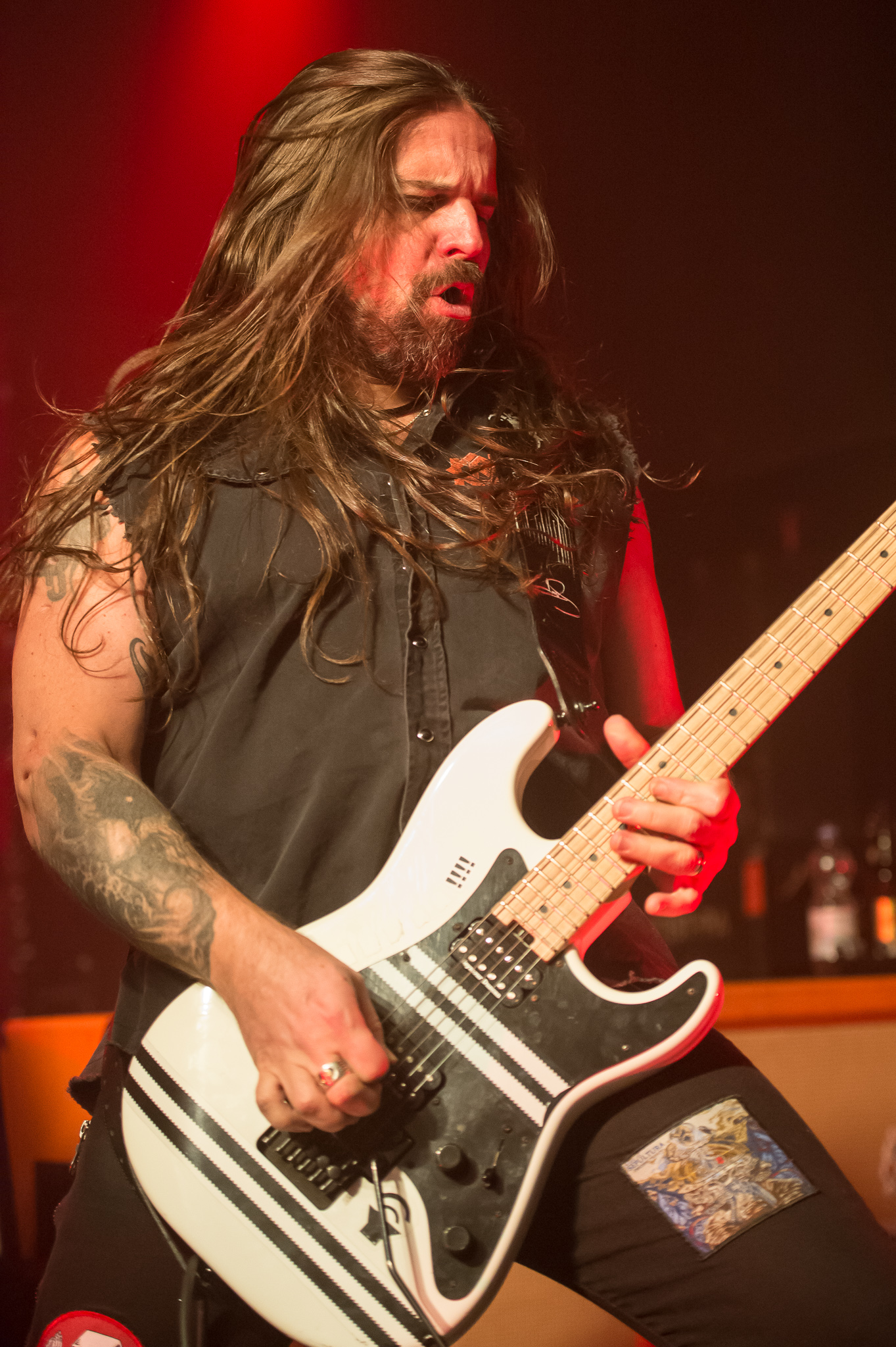 Andreas Kisser,Concertbüro Franken,Der Hirsch,Konzert,Livekonzert,Livemusik,Sepultura